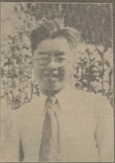 陶云逵先生遗像:[照片] 文献来源： 《国立中央研究院历史语言研究所集刊》 出版时间： 1948 年 卷期(页)： [ 第17卷 ，1页 ]